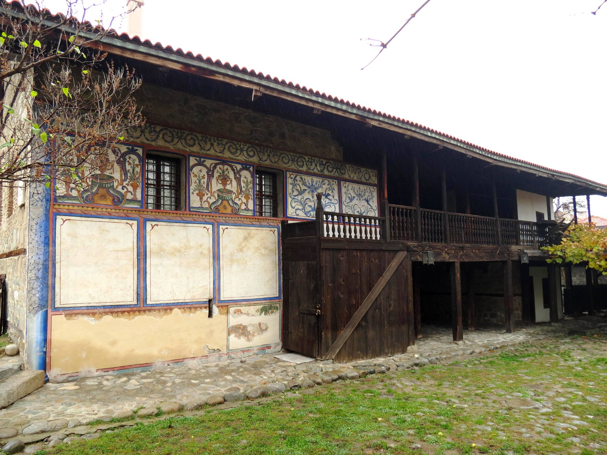 Веляновата къща